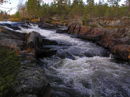 Från mina egna bilder. Fotograf: Tommy Halvarsson